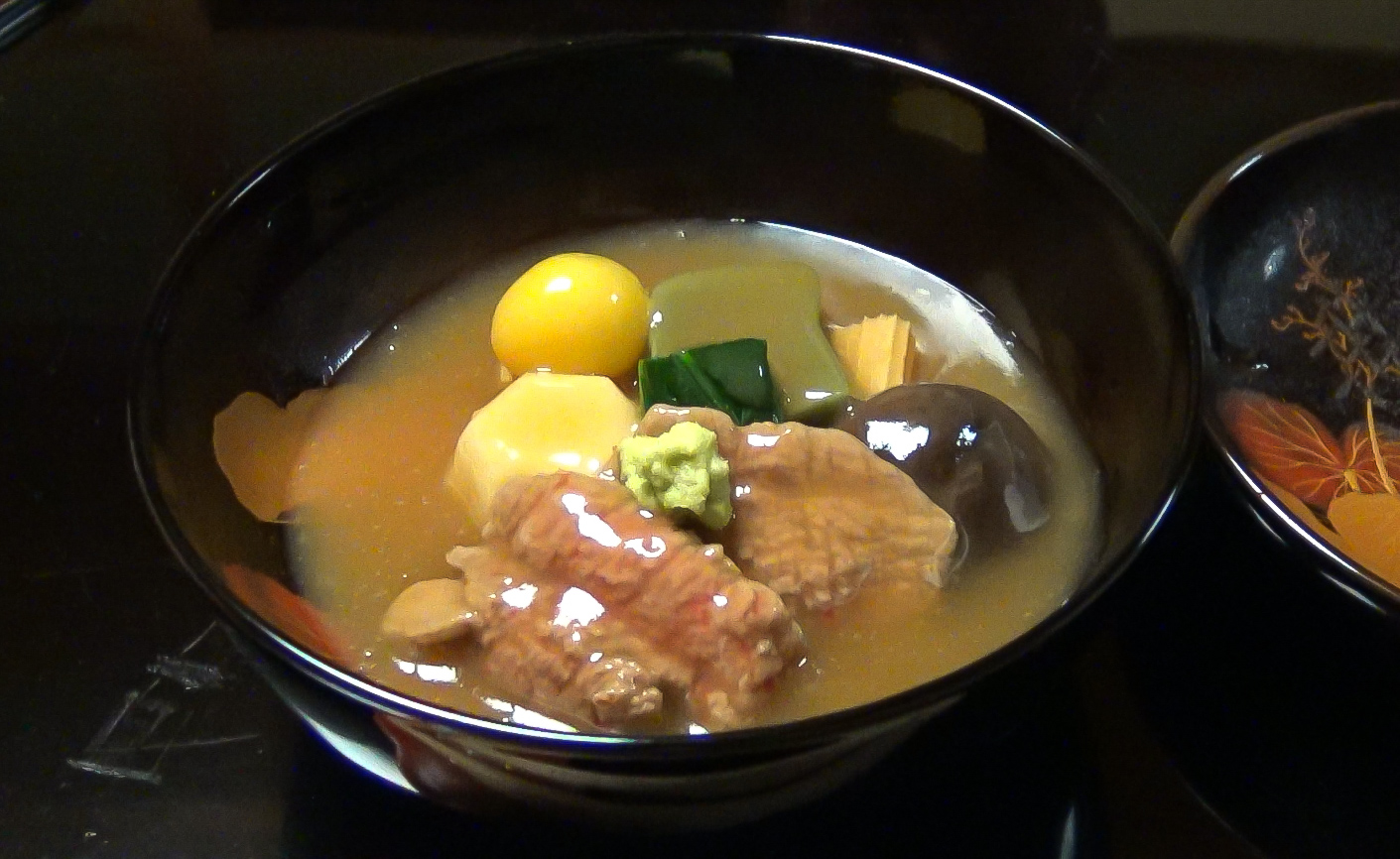 治部煮（金沢市・料亭旅館 浅田屋） （2015年3月13日撮影） 本来もっと画質のよいものを掲載したいのですが、 「治部煮丼」が代表写真となっていて、海外のウィキにまで 使われており、それでは誤解を招くと思いアップしました。 次回、金沢へ行く機会があれば、マシな写真を撮影したいと 思いますし、すでにお持ちの方はもっとシャープで美しいものに 変えていただいてもかまいません。あまりに料理が美味しく 酒も進みまして^^;、ブレ気味の4K動画からの切り出しとなりました。 どうぞ、ご容赦下さい。